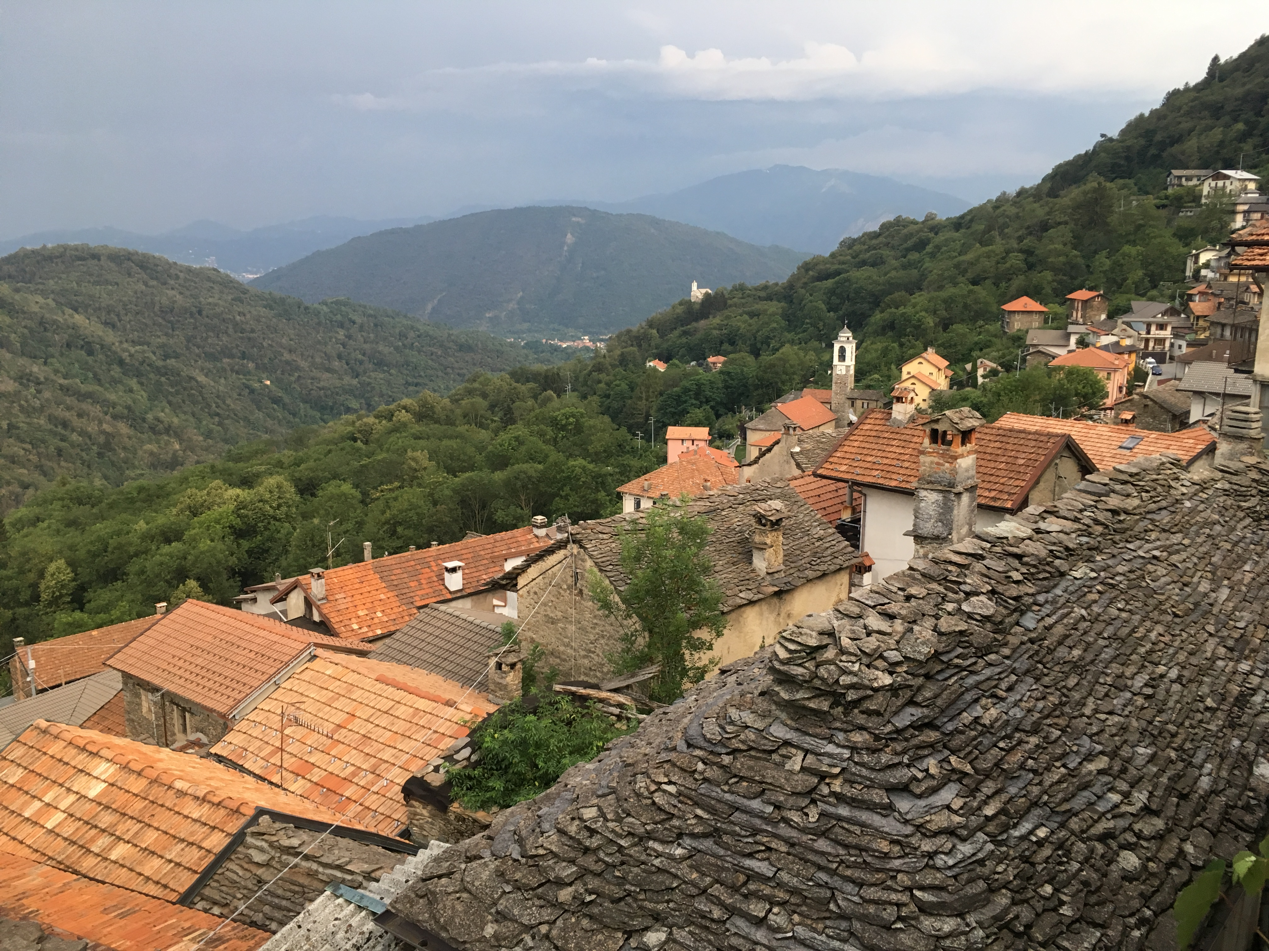 Caprezzo mit Steindächern im Vordergrund, mit der Kirche San Bartolomeo und dem Kirchlein Madonnina im Hintergrund